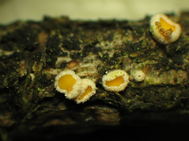 Lärchen-Nadelholzbecherchen (Lachnellula occidentalis)